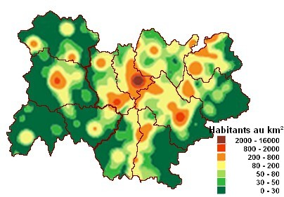 Densité de population de la région Auvergne-Rhône-Alpes en 2006 d'après un document INSEE consulté le 12/06/2015 sur la page